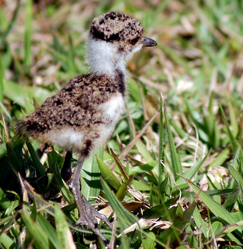 Vanellus chilensis chick. Jardim Botânico de São Paulo, Brazil